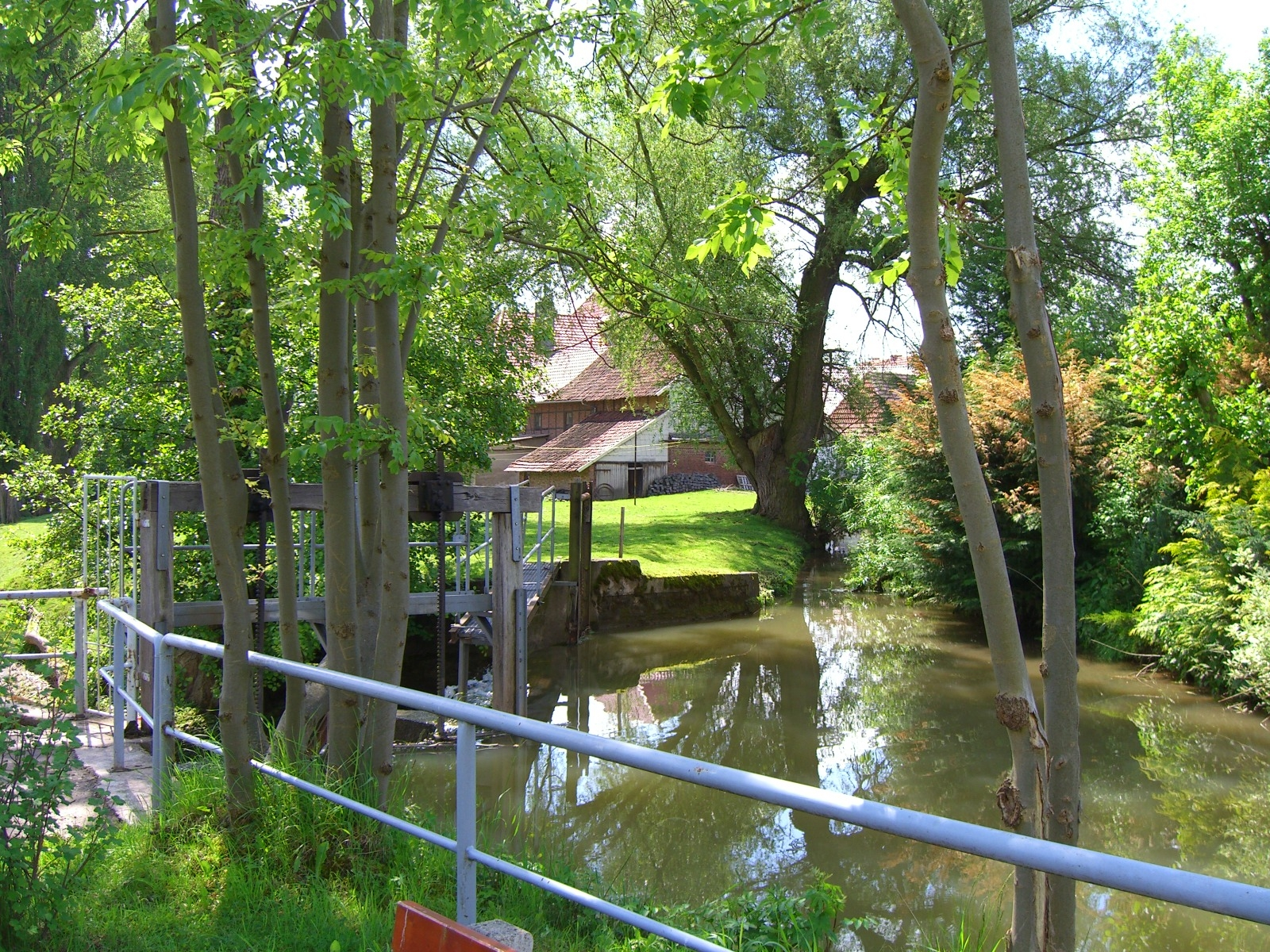 Wipperwehr in Gernrode aus Richtung Osten